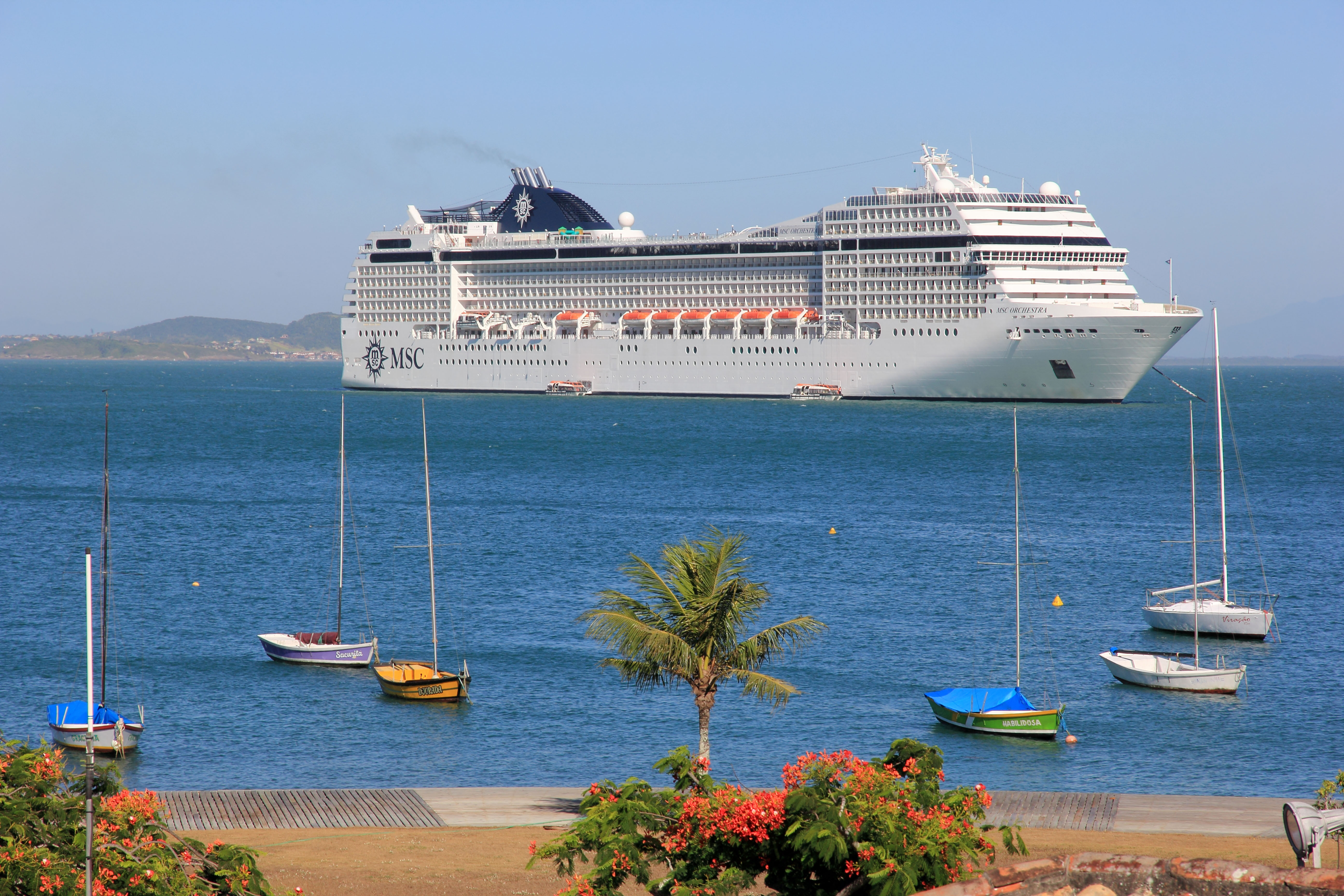 MSC Orchestra ancorado em Búzios